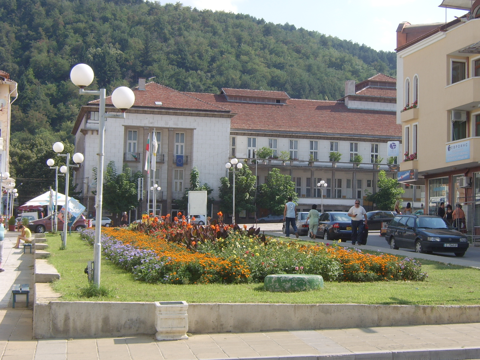 Central Petrich, Bulgaria